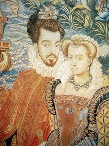 Le roi Henri III et la reine Louise de Lorraine. Détail de la tapisserie dite de « Fontainebleau », appartenant à la série des « tapisseries des Valois » conservées au musée des Offices de Florence.